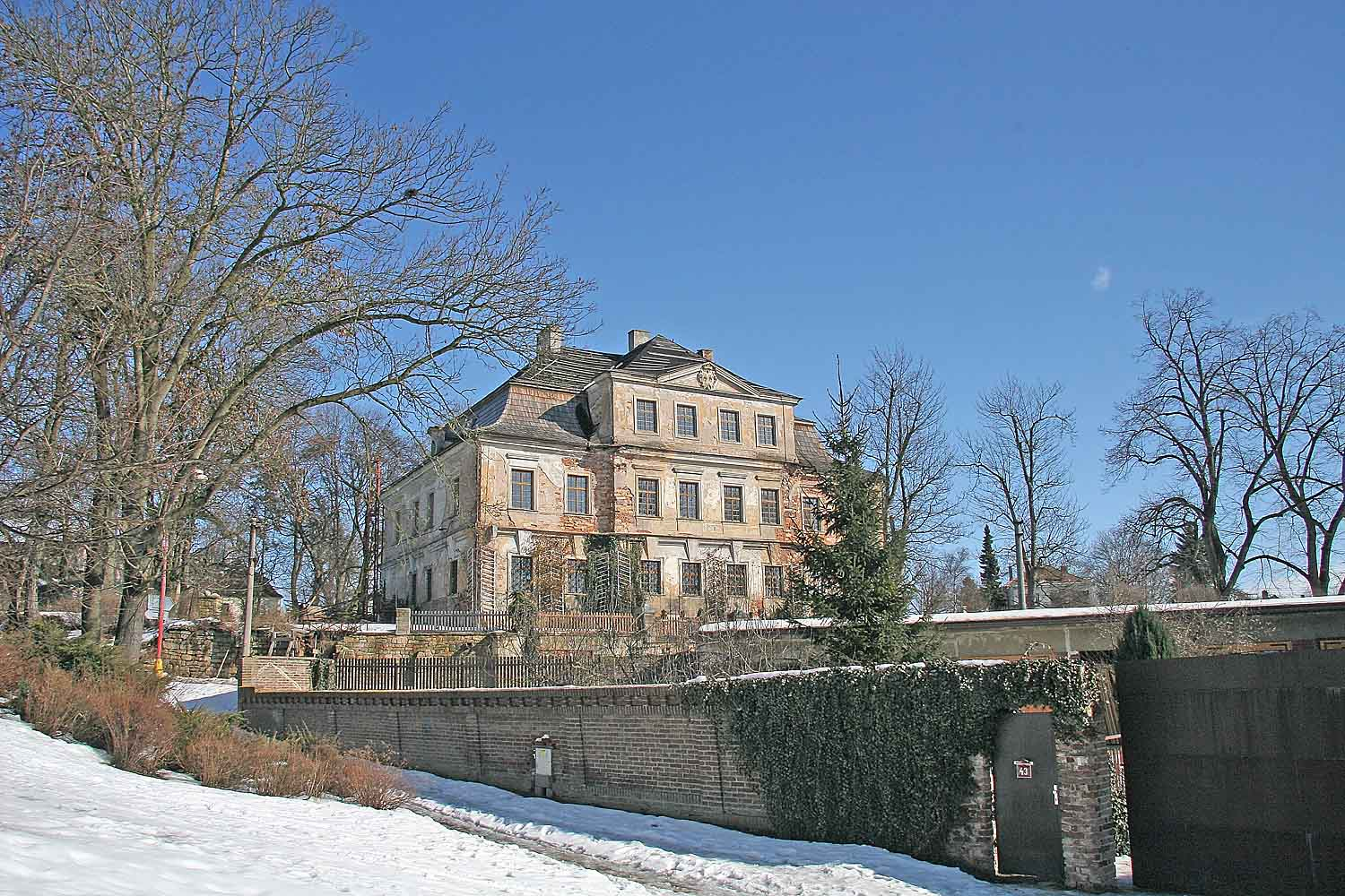 Castle in village Neděliště, district Hradec Králové, Czech Republic Autor: Prazak Date: 20. 2. 2006